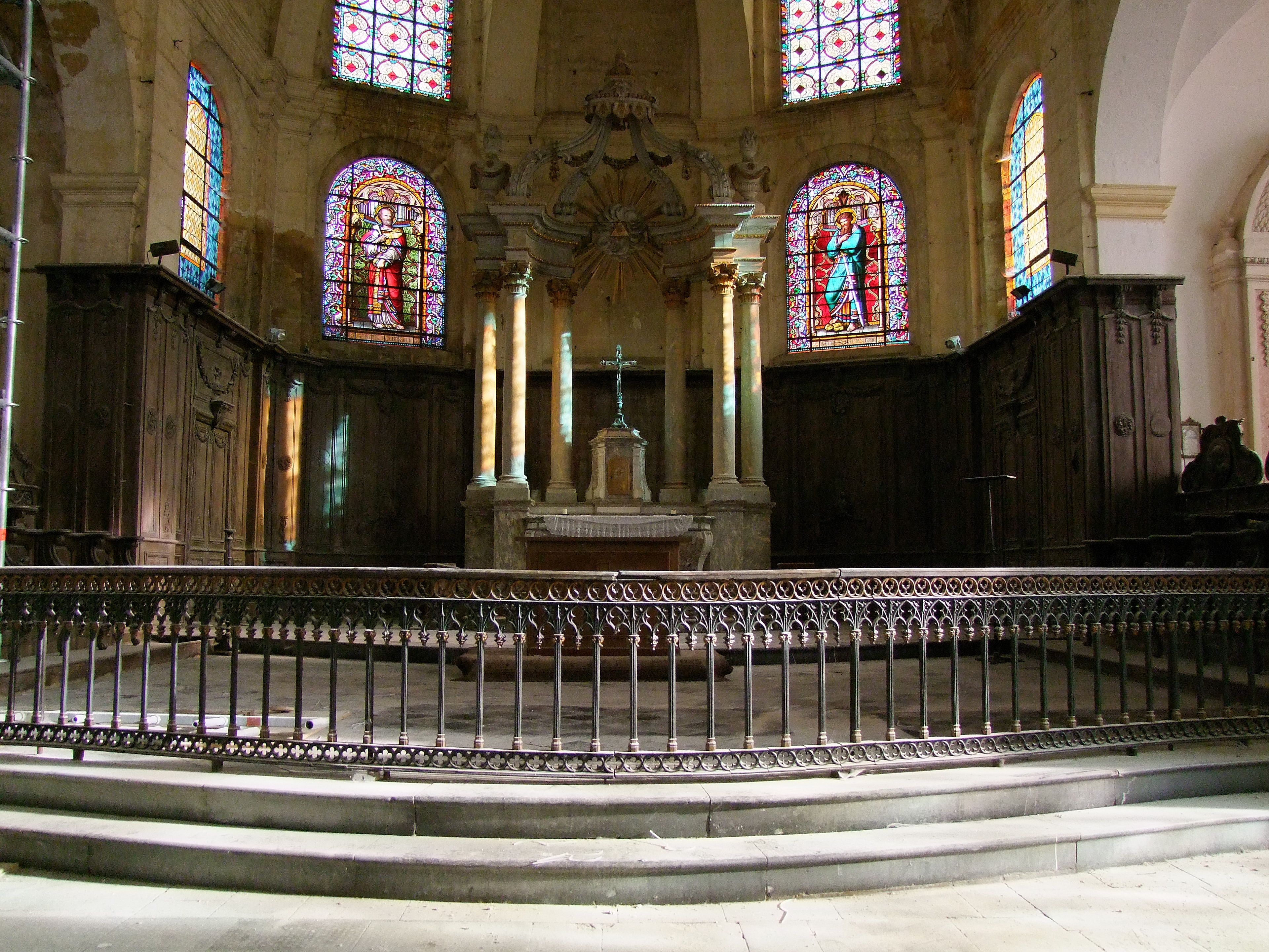 Chœur de Saint-Martin, Montmédy, Meuse, France